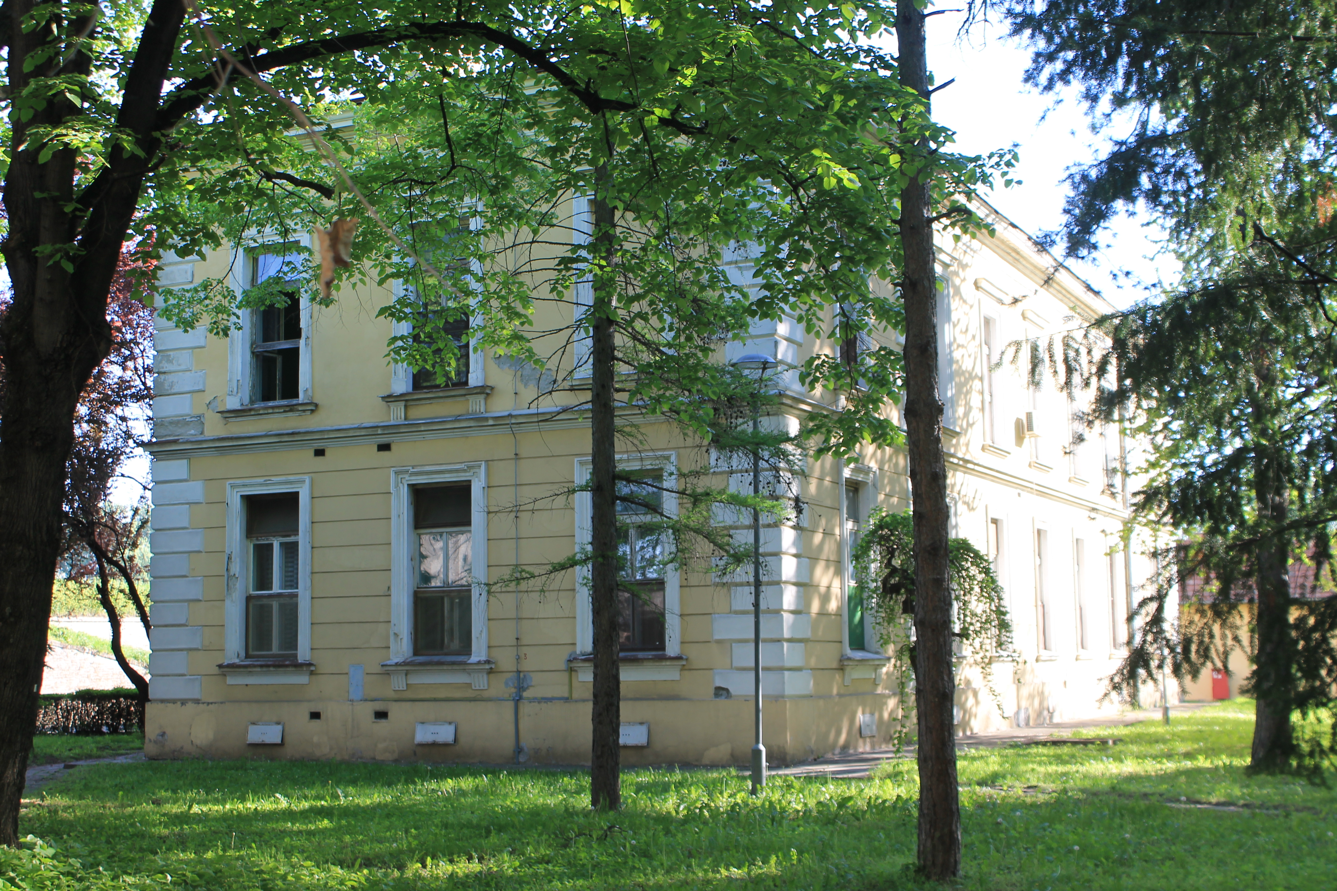 Vojna bolnica Petrovaradin